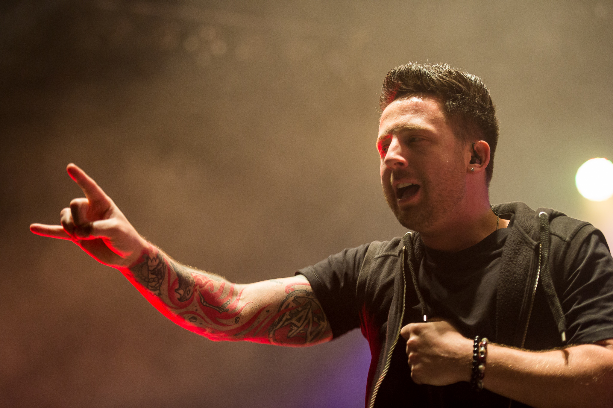 ARGO-Konzerte,Alternarena,Festival,From Ashes To New,Konzert,Livekonzert,Livemusik,Matt Brandyberry,Musik,RiP,Rock im Park 2016